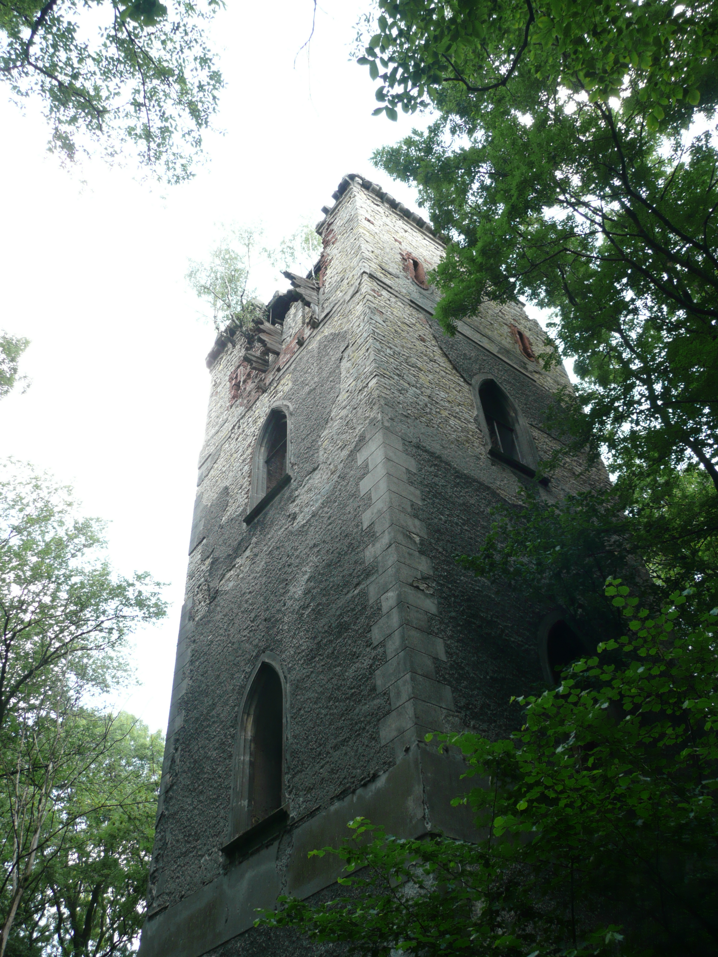 Samotna wieża